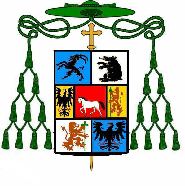 Wappen Johann Georg Bossi, Bischof von Chur-St. Gallen 1835-1844